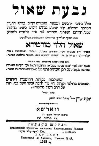 MORTEIRA, SAUL B. JOSEPH HALEVI,givaat shaul